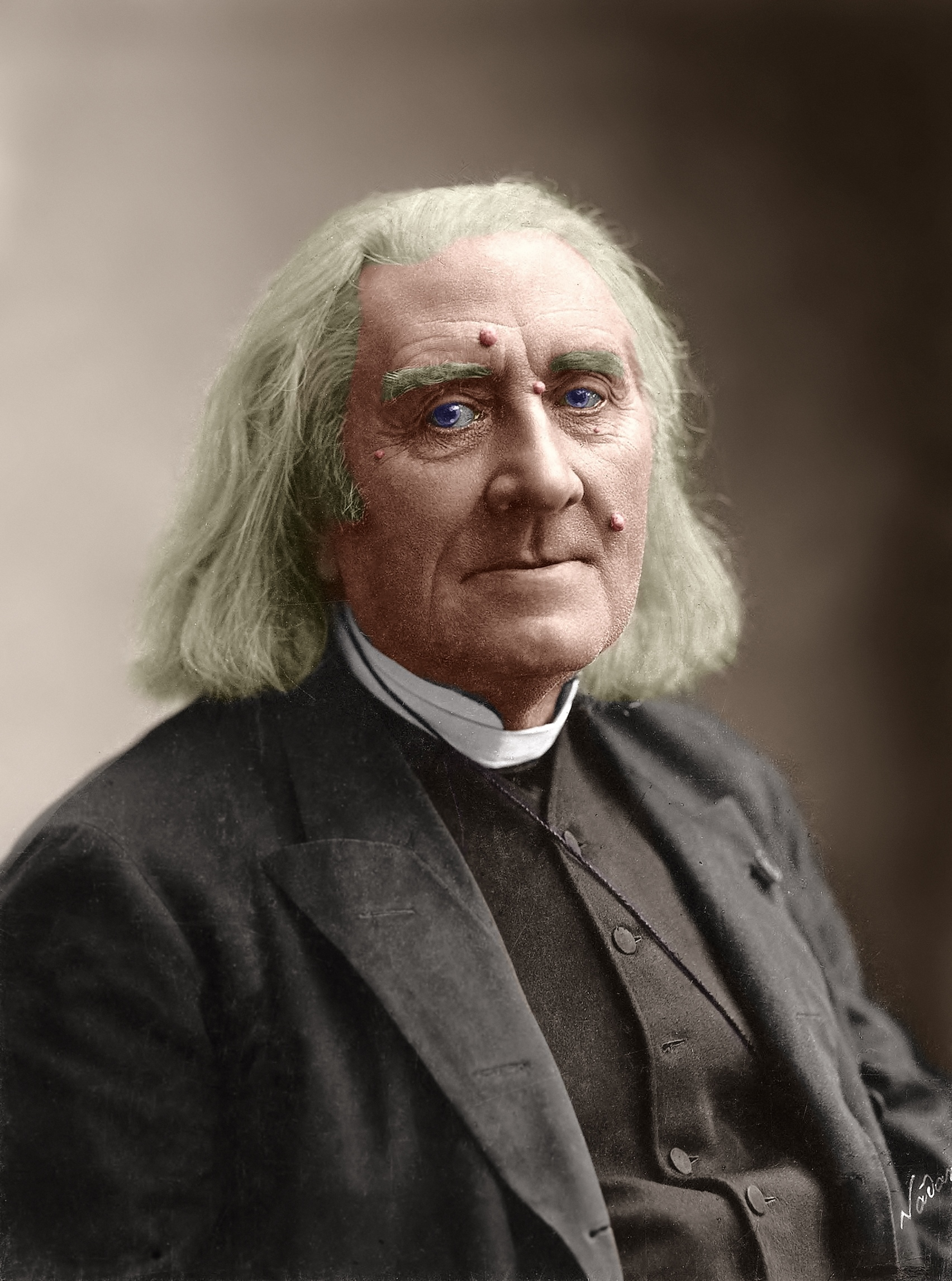 ナダールによる晩年のフランツ・リスト